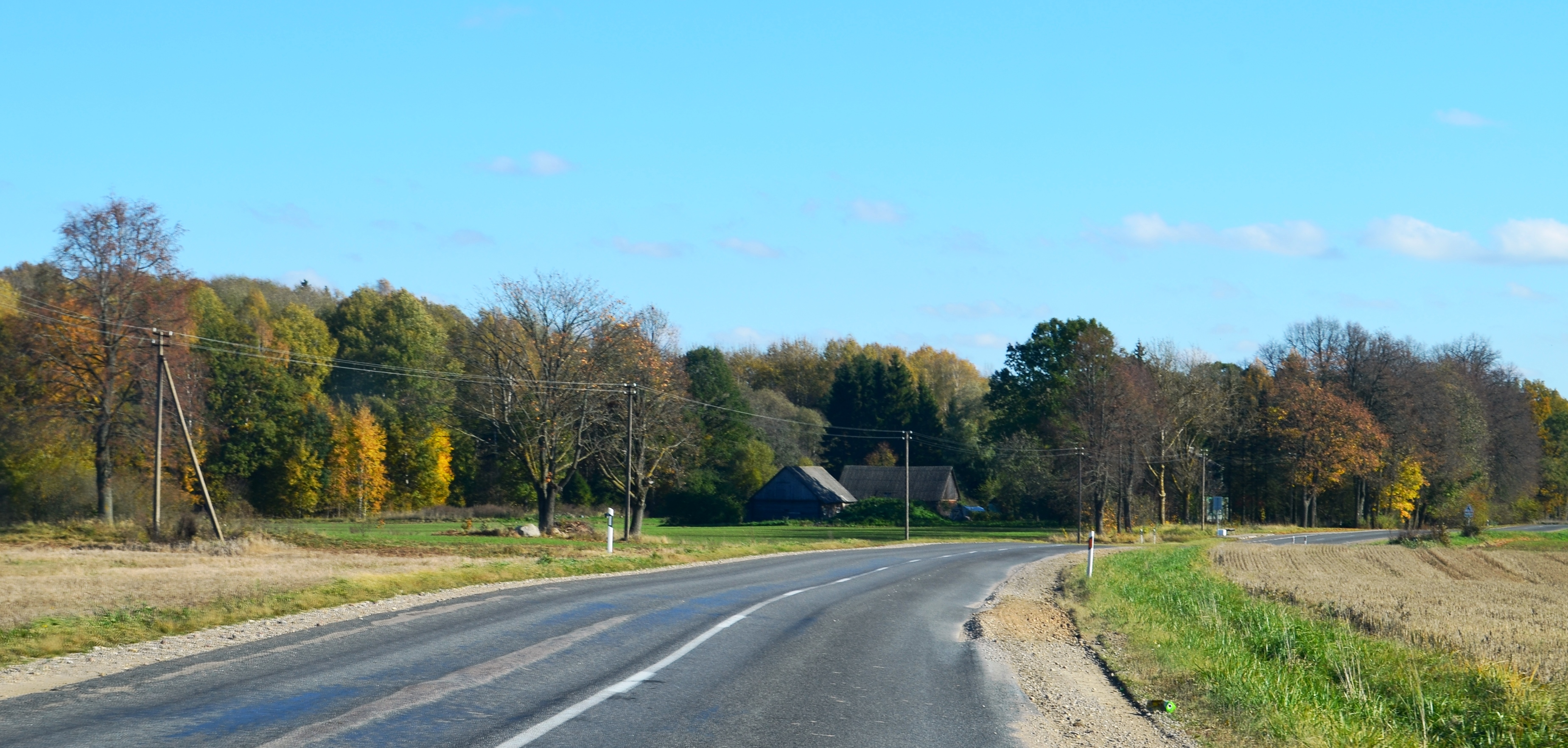 Viliukai, Ukmergės r.